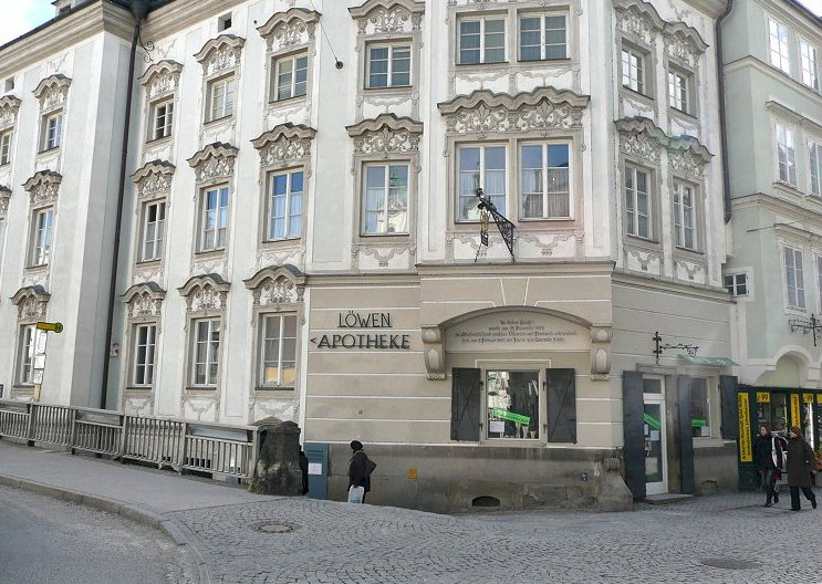 Löwenapotheke in Steyr